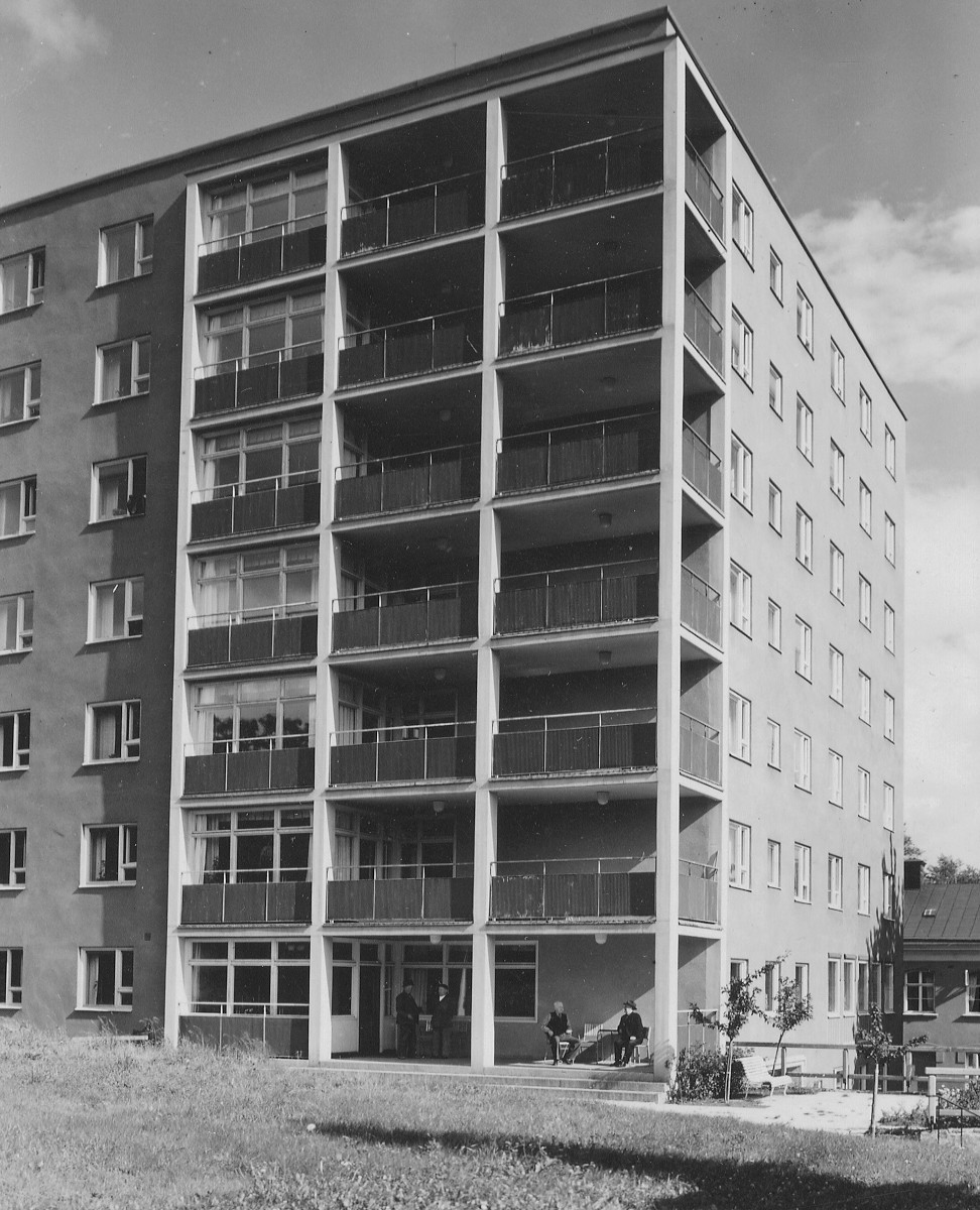 Dalahöjdens äldreboende (Fastigheten Grötlunken 2) arkitekter Nils Sterner och Tore Virke